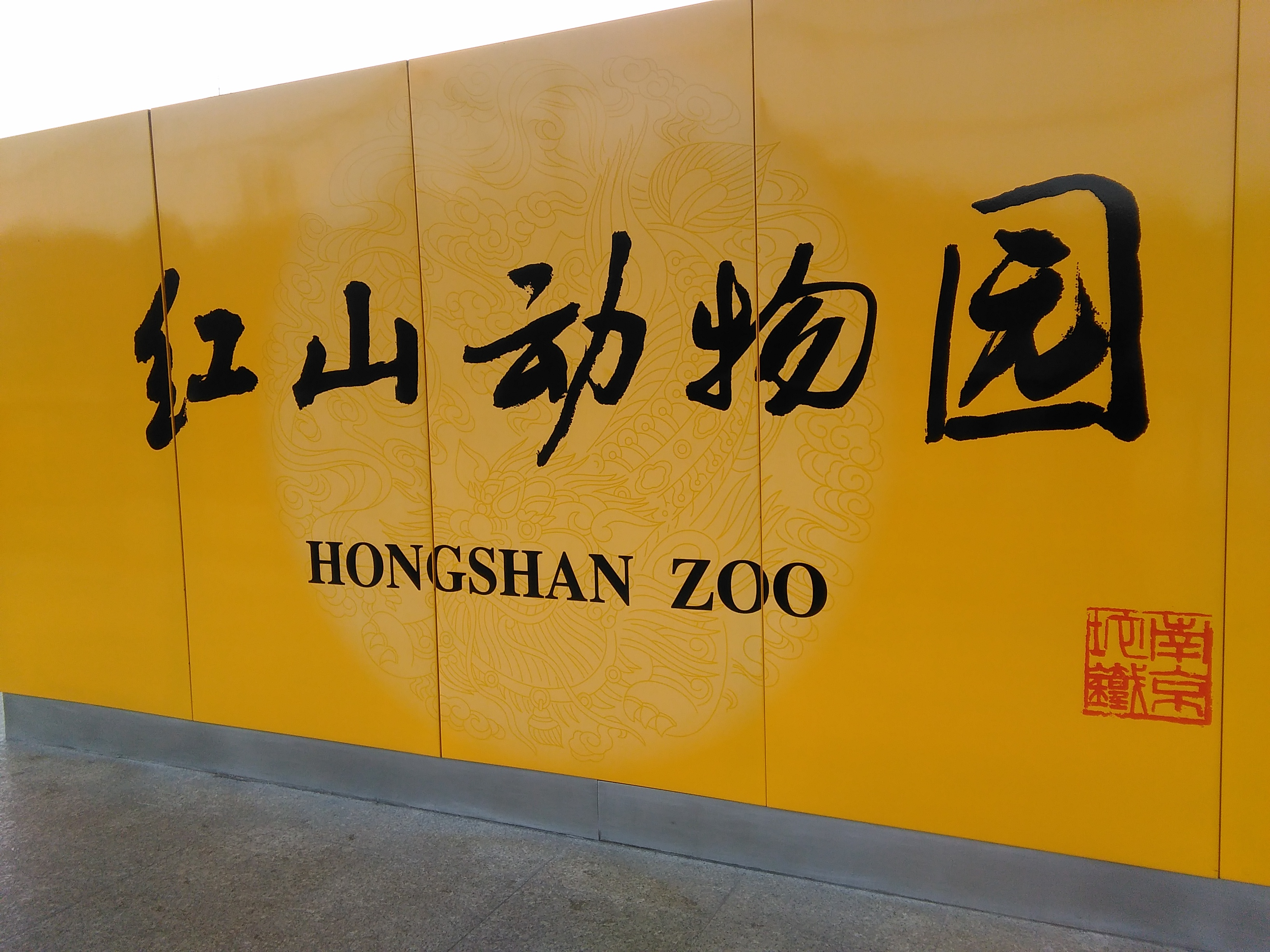 南京地铁红山动物园站，站台。